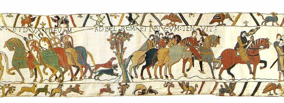 Szene 8: Guido von Ponthieu geleitet die Gefangenen zu seinem Schloss